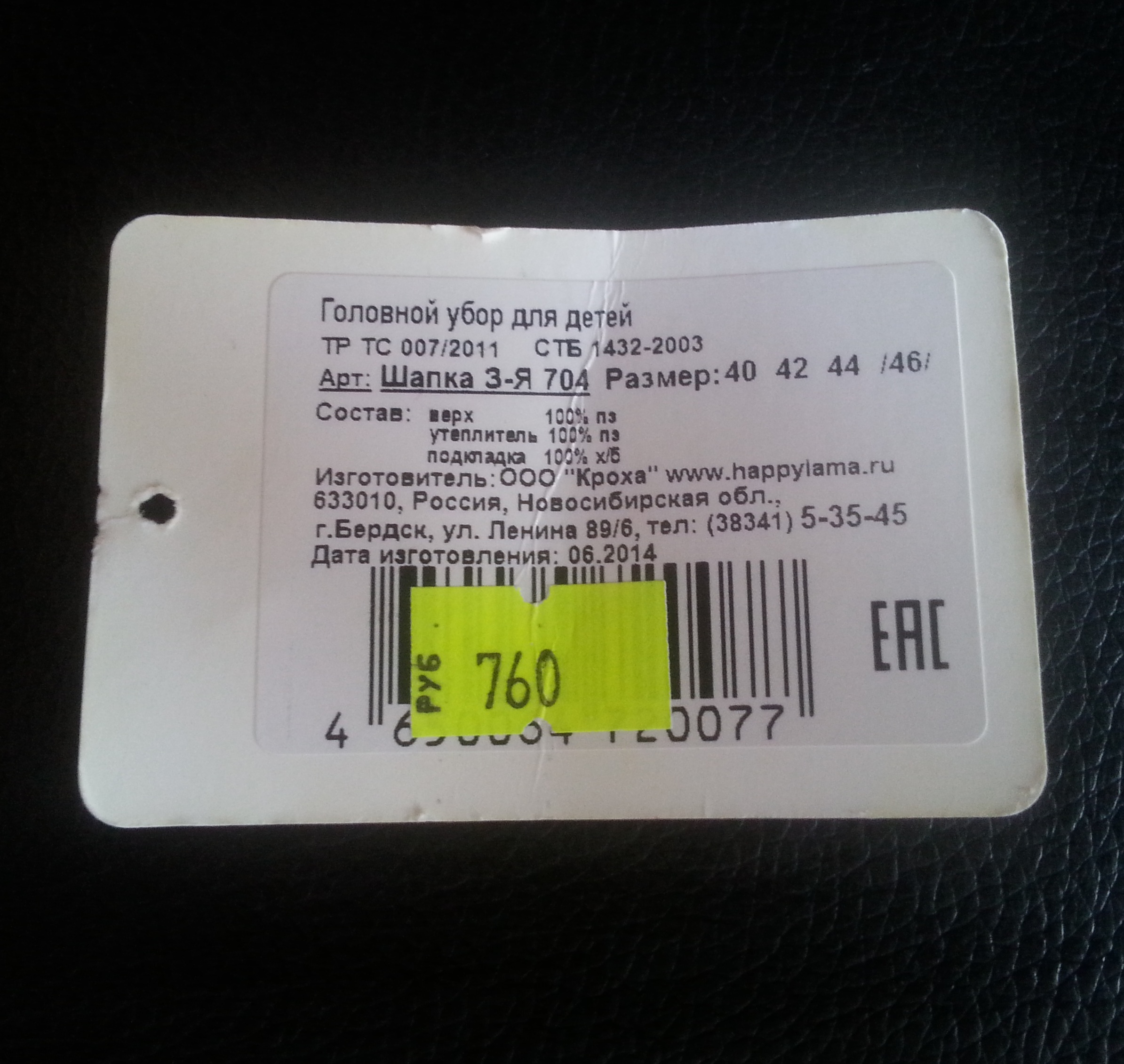 Этикетка детской шапочки, изготовленная в России по белорусскому стандарту